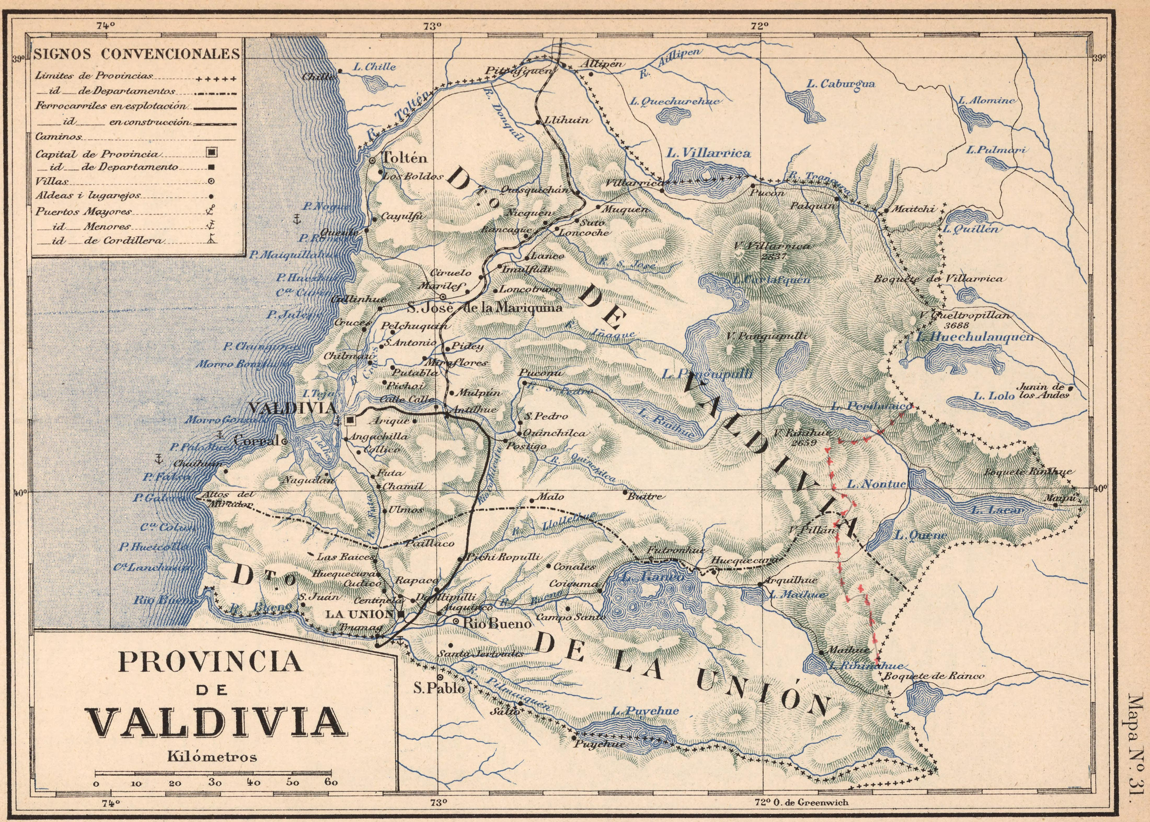 Atlas de Chile Arreglado para la Jeografia Descriptiva de la Republica de Chile por Enrique Espinoza.